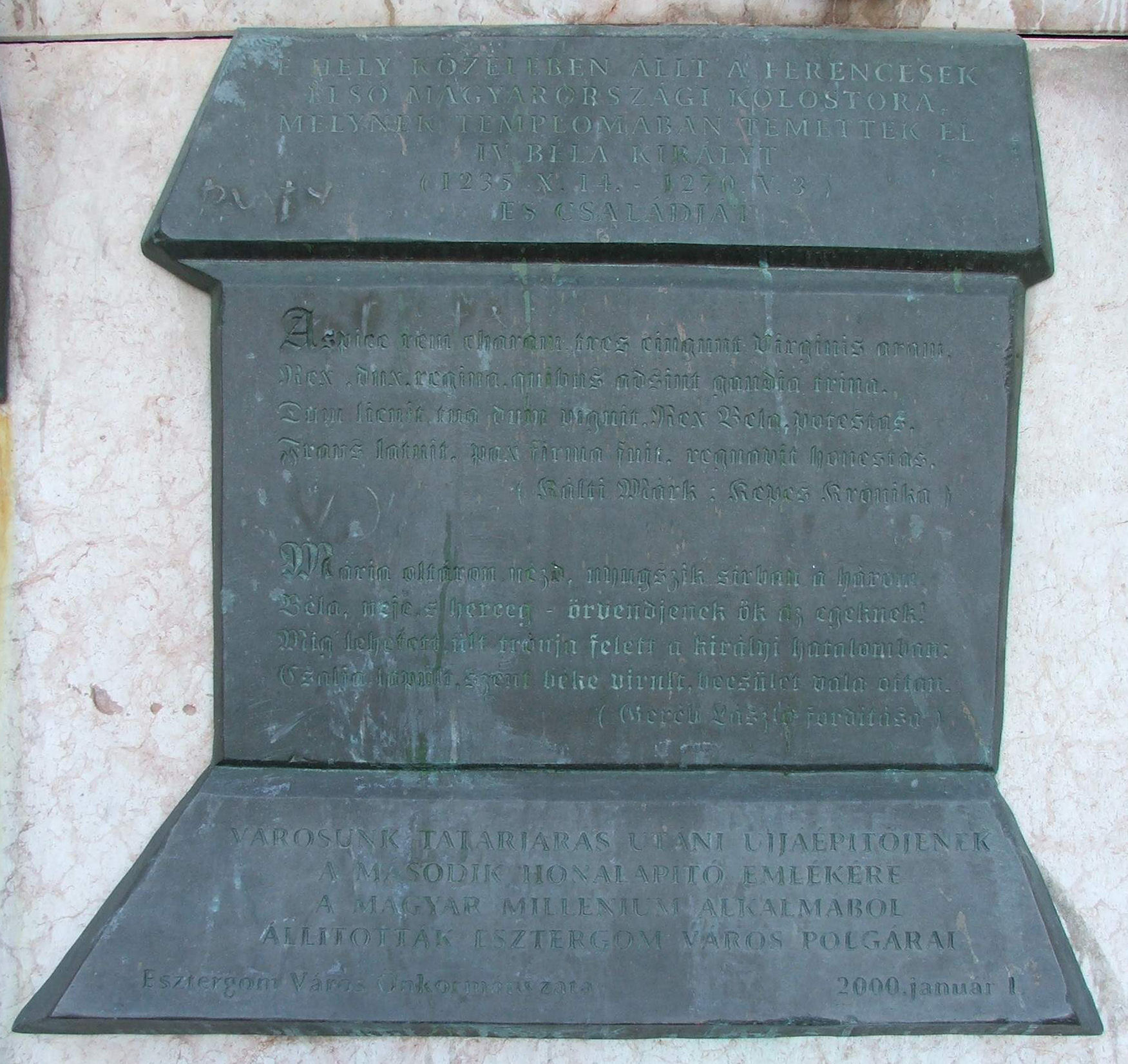 Emléktábla IV. Béla temetkezési helye mellett